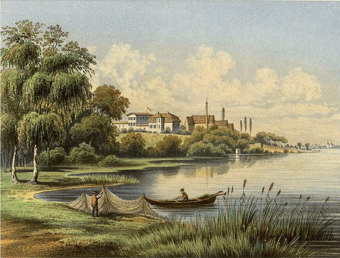 Schloss Neudorf bei Bentschen, Provinz Posen, Lithographie von Alexander Duncker, 1869